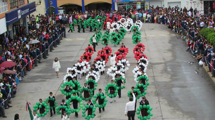 Tlaxcoapan